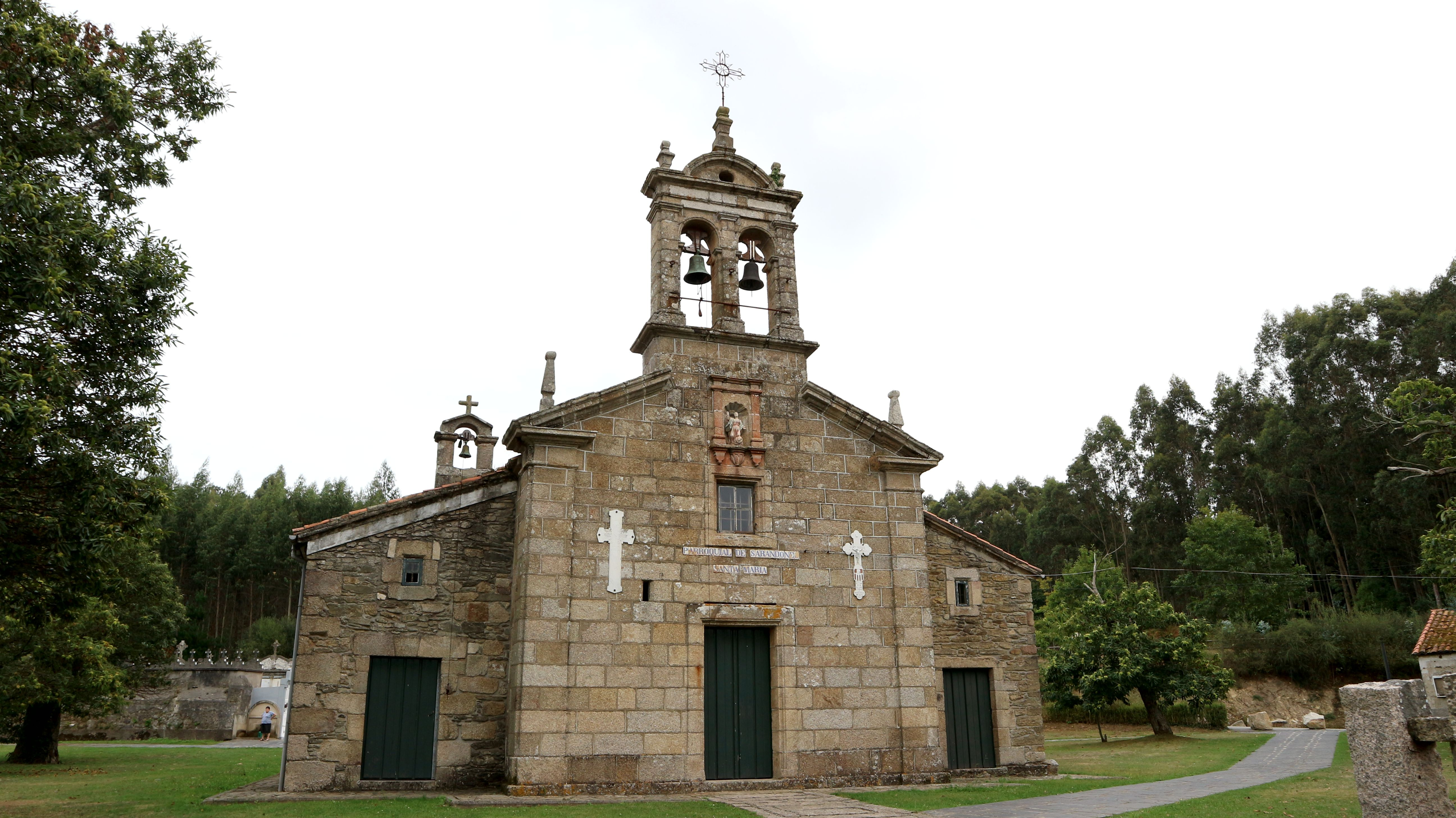 Igrexa de Santa María de Sarandós. En Sarandós, Abegondo.